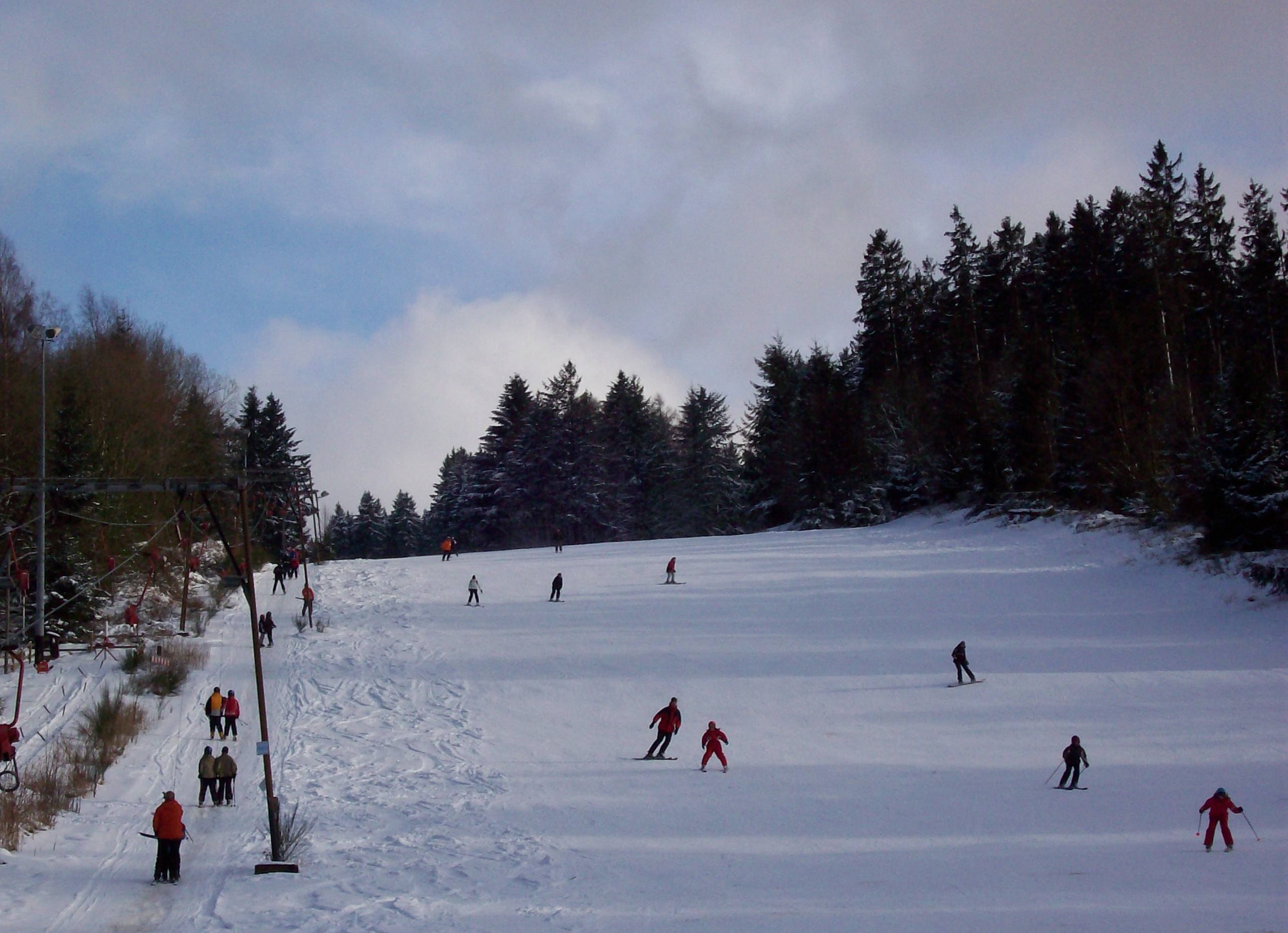 Schmallenberg Skilift (Germany)